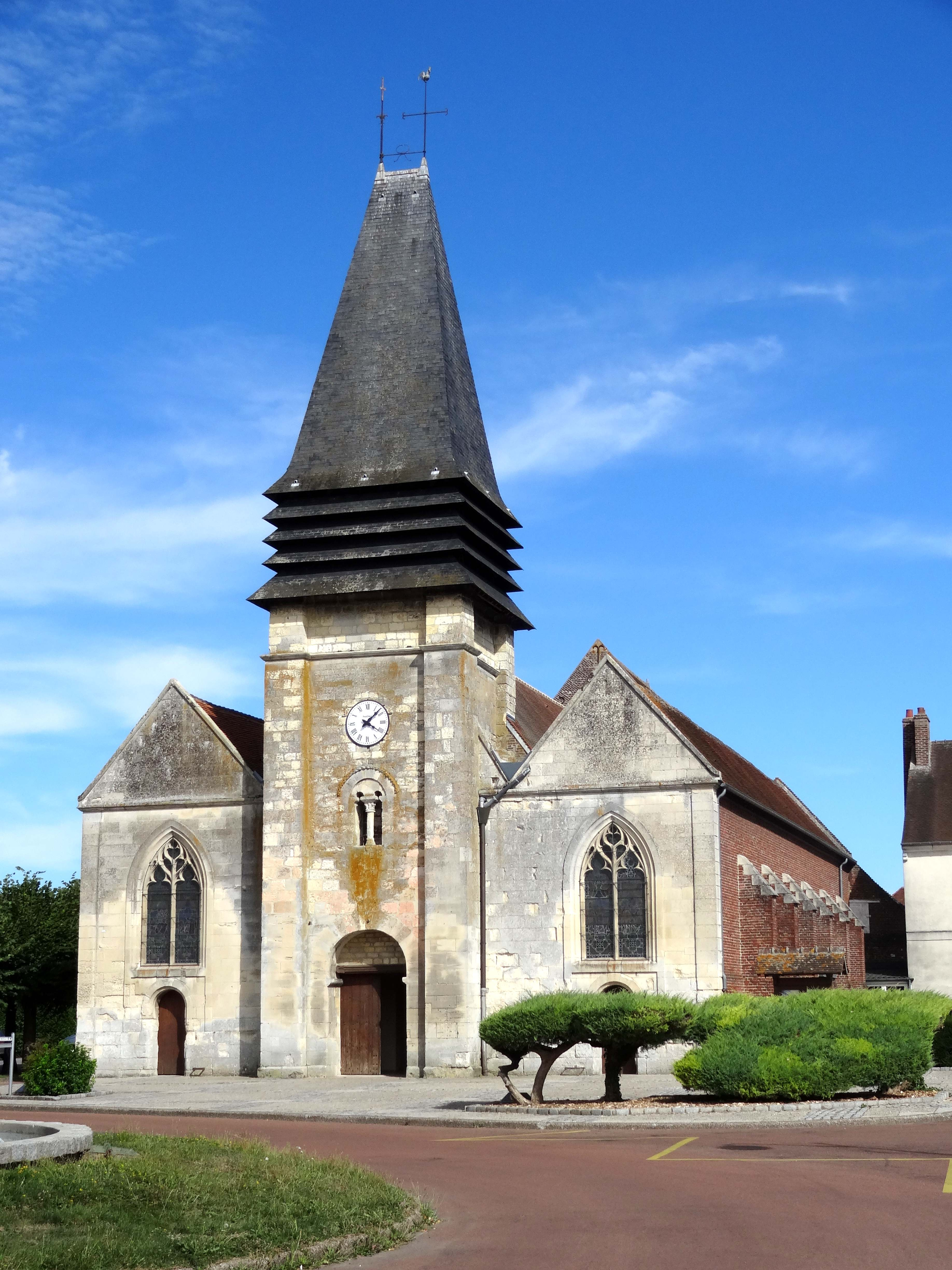 Église Saint-Denis - voir titre.